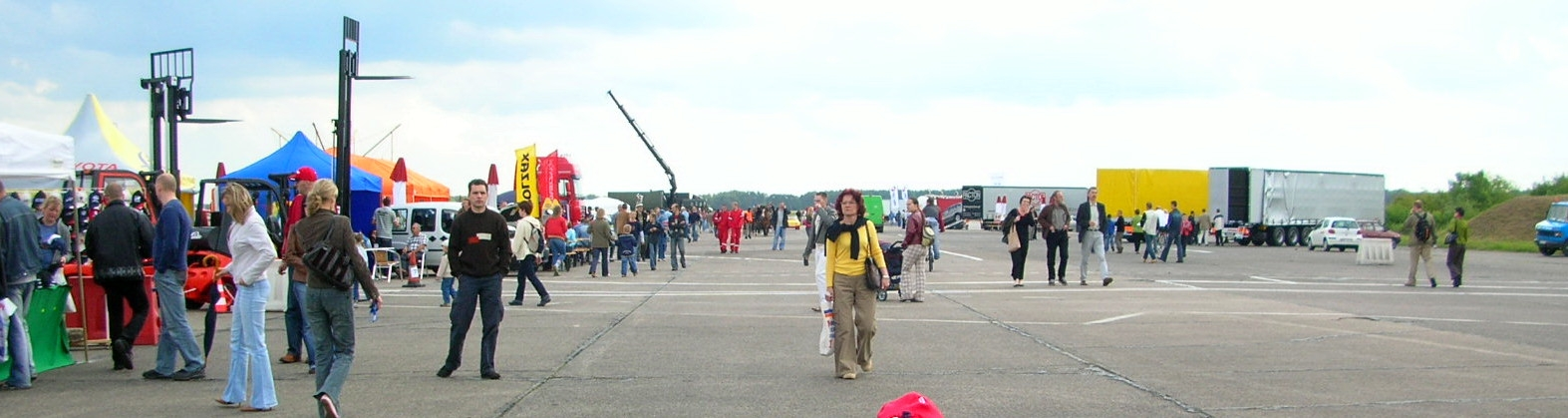 Pas startowy lotniska wojskowego w Bydgoszczy podczas festynu lotniczego